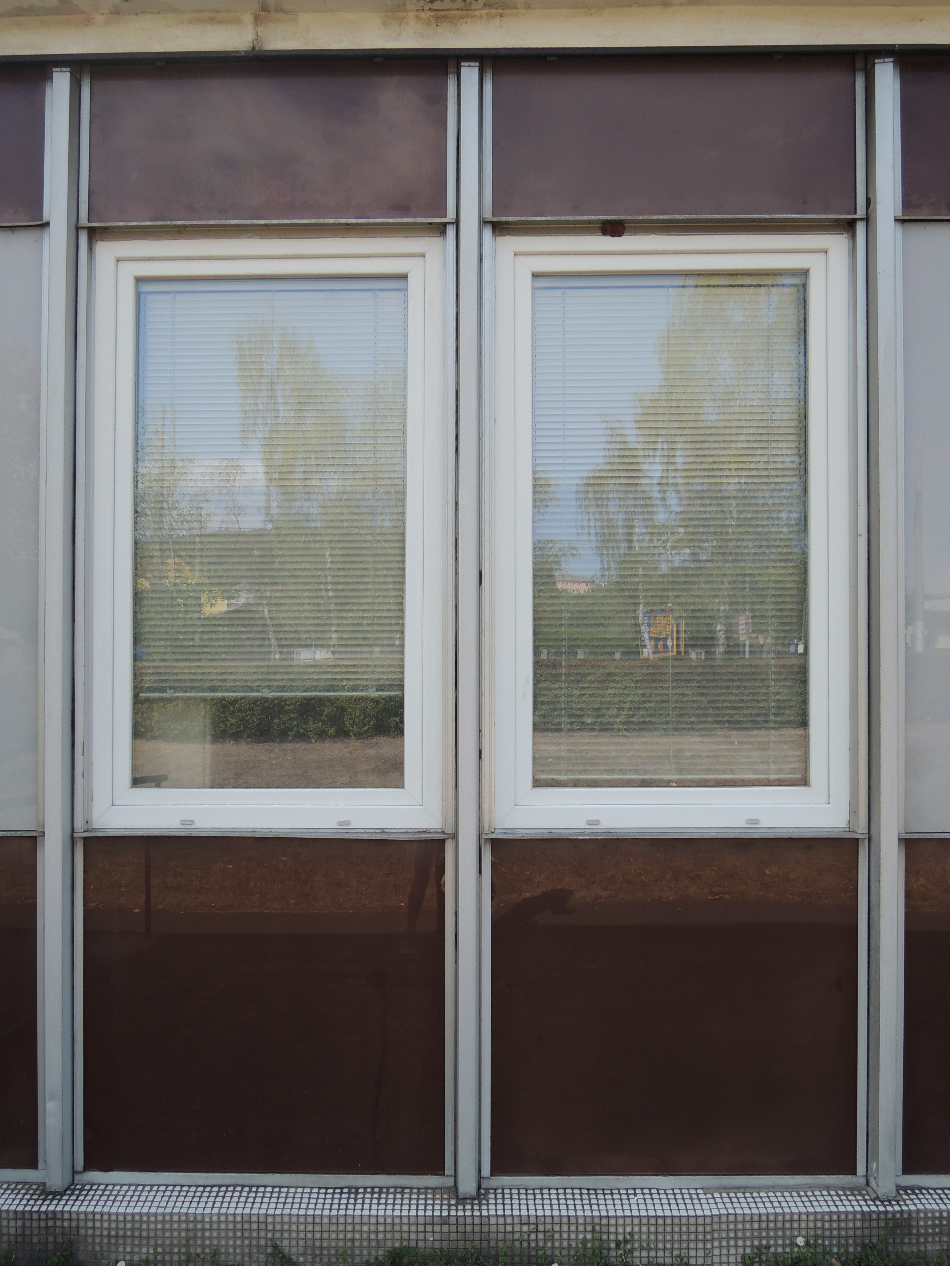 Typické červené boletické panely na Severní Terase v Ústí nad Labem.